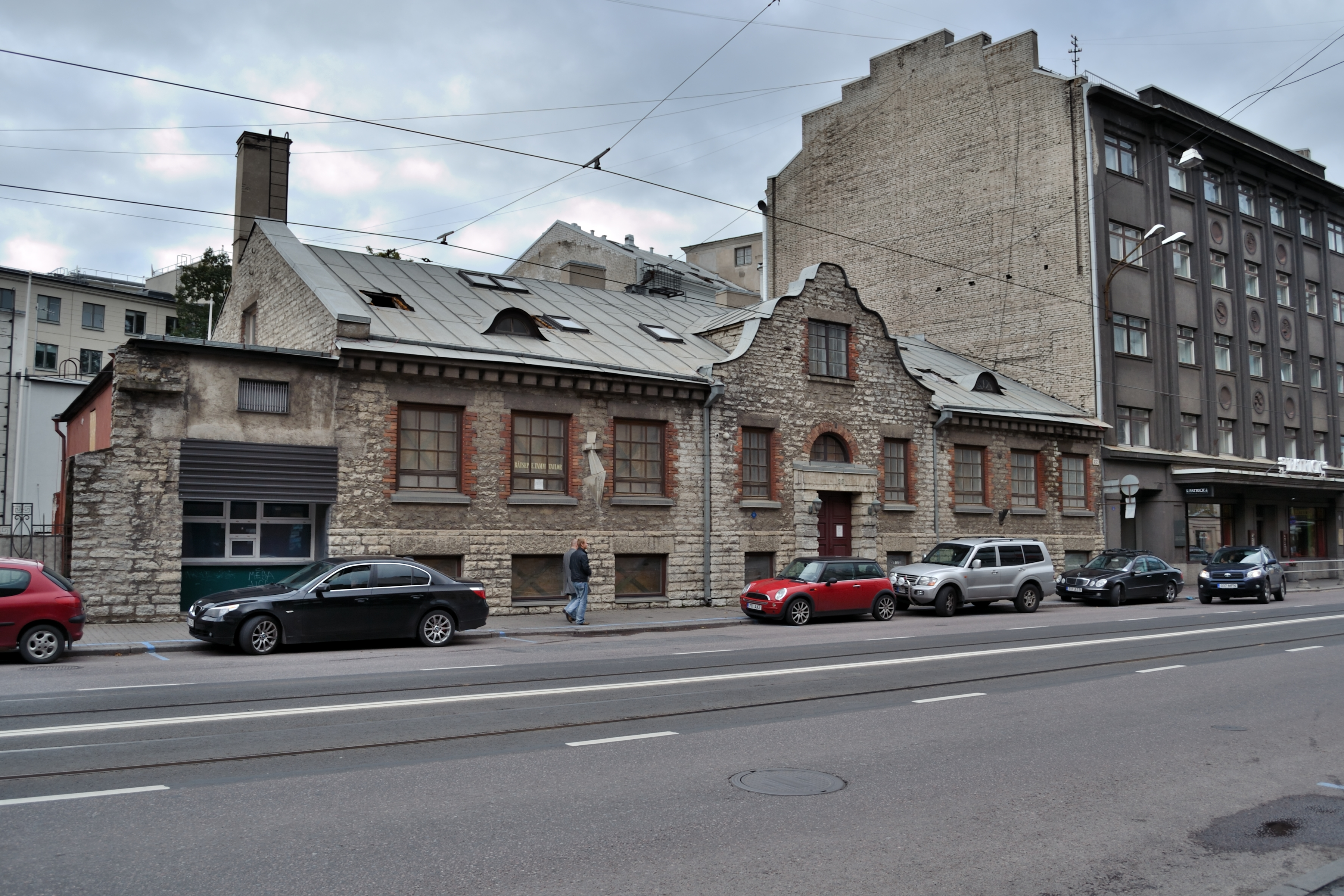 Tallinn, Kawe keldri hoone kelder ja fassaadid